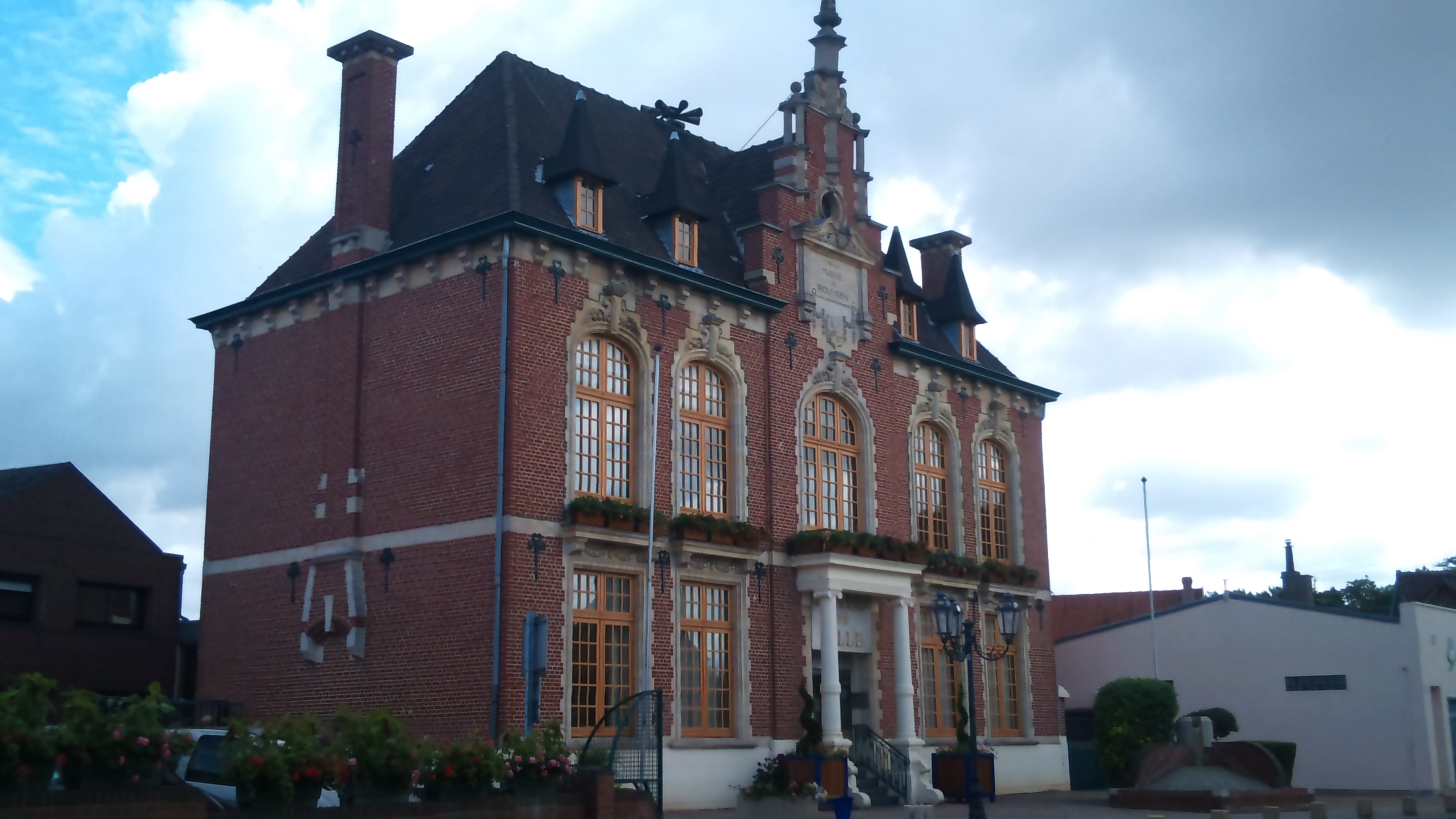 Rouvroy - Mairie